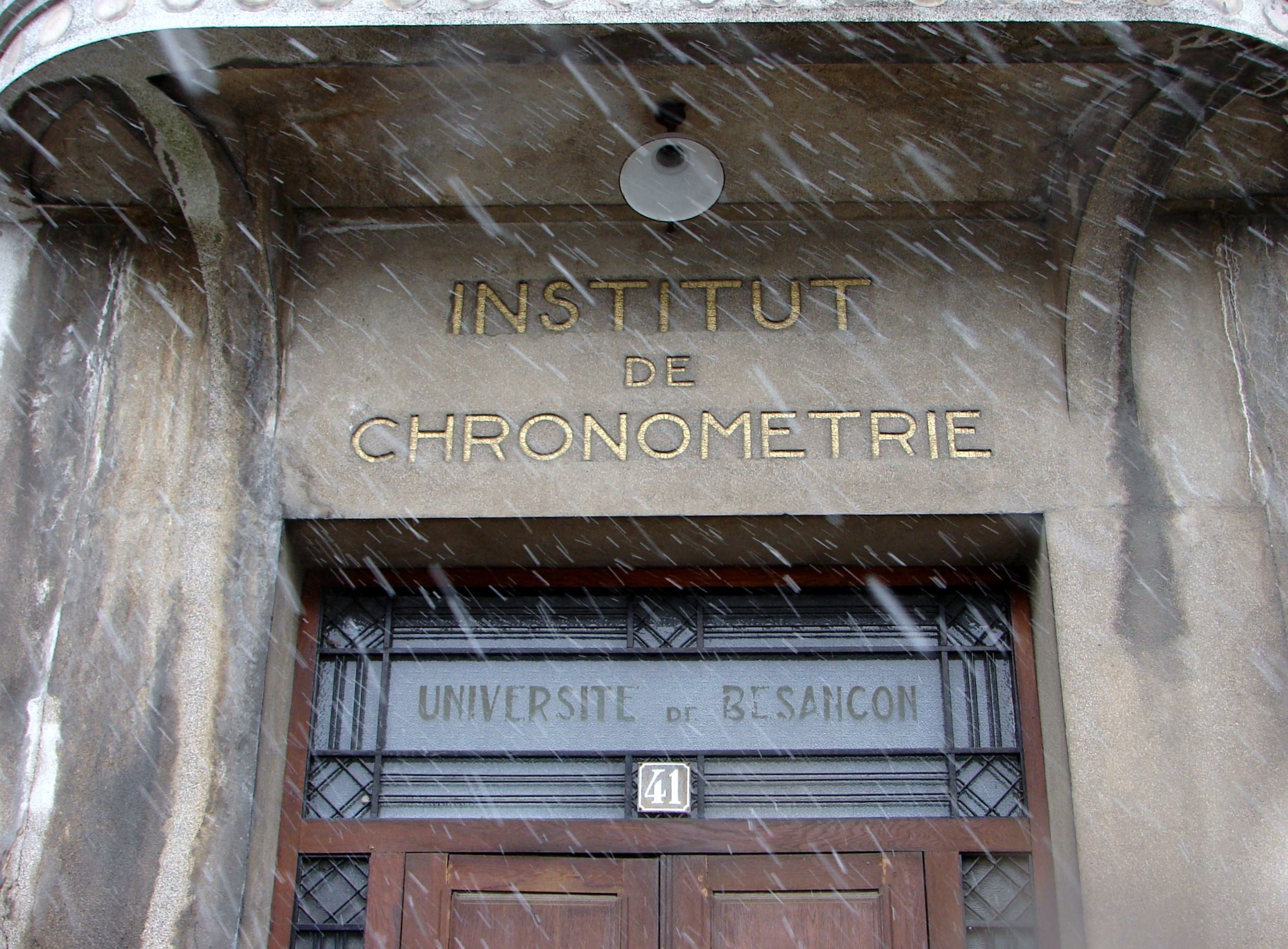 Entrée du lycée Jules Haag de Besançon (Doubs, France).